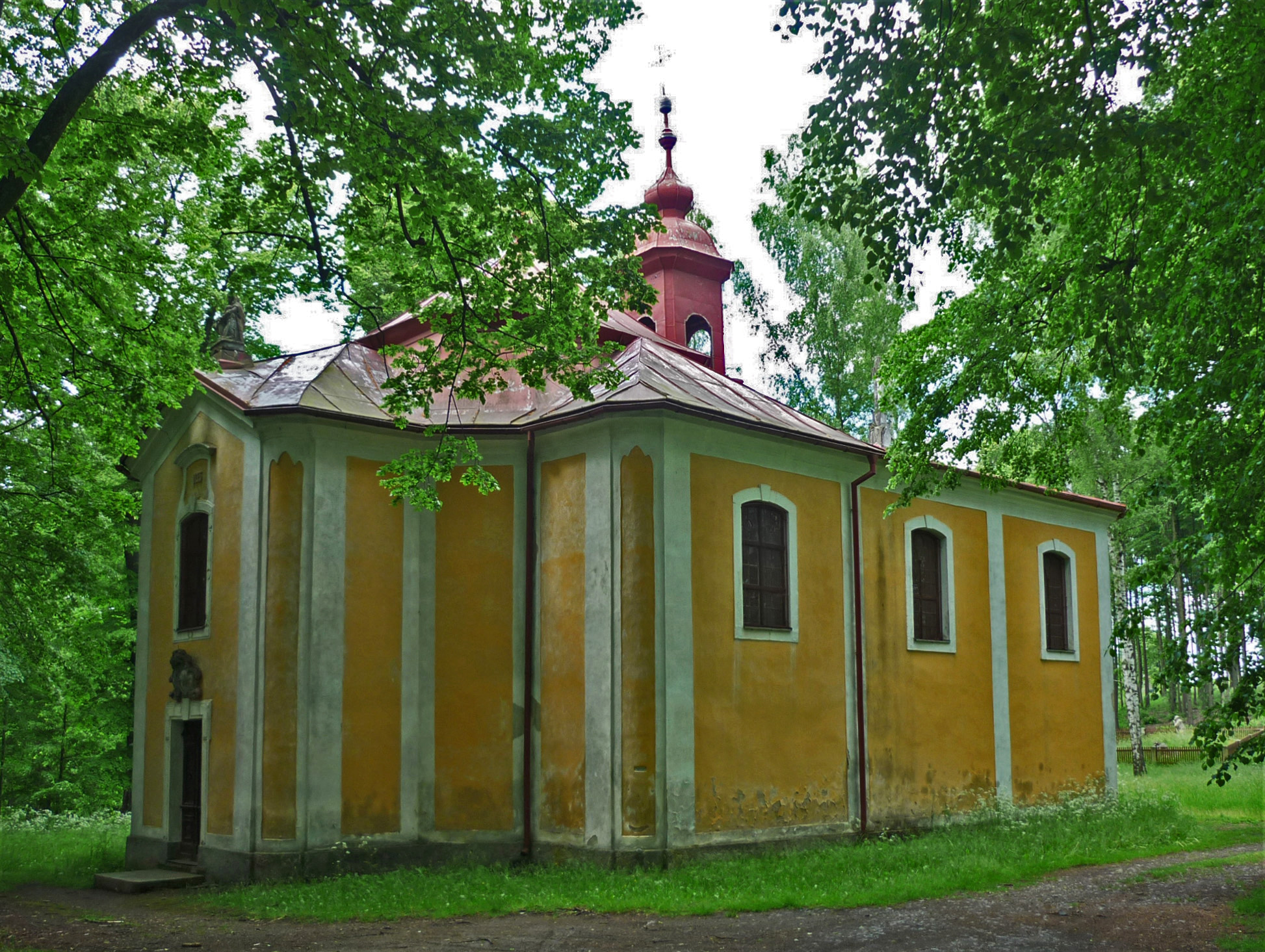 Kapelle der Hl. Anna auf dem Annenberg (Anenský vrch) bei Lobendau (Lobendava) in Nordböhmen